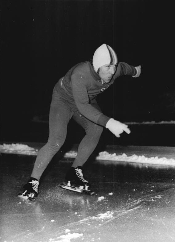 Manfred Winter ADN-ZB Mittelstädt 19.1.74-hf-Italien: Cortina d'Ampezzo-Nach dem ersten Tag (18.1.74) der Eisschnellauf-Juniorenweltmeisterschaften liegt der DDR-Mehrkampfmeister Manfred Winter (hier bei einem früheren Wettkampf) mit 88,745 Punkten vorerst auf dem zweiten Platz. M. Winter kam über 500 m in 43,15 s auf den 8. und über 3000 m in 4:33,51 min auf den dritten Rang. Abgebildete Personen: Winter, Manfred: Eisschnelläufer, SC Karl-Marx-Stadt, DDR